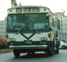 Isuzu BU in Chiba-chuo bus